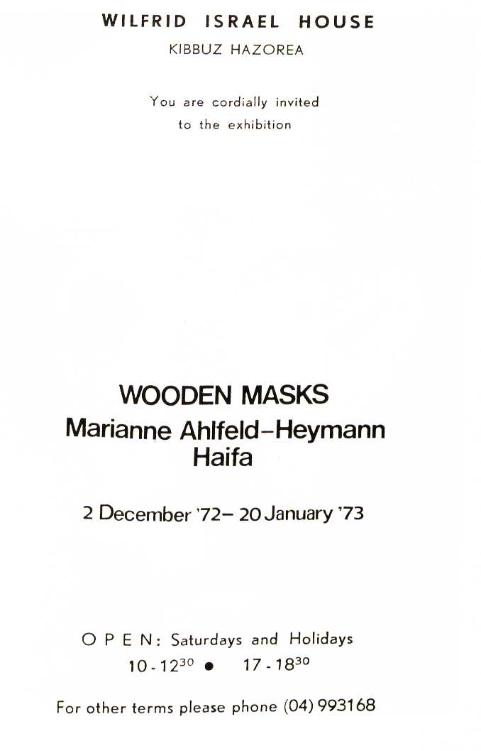 Wilfrid Israel Museum Marianne Ahlfeld-Heymann 1973